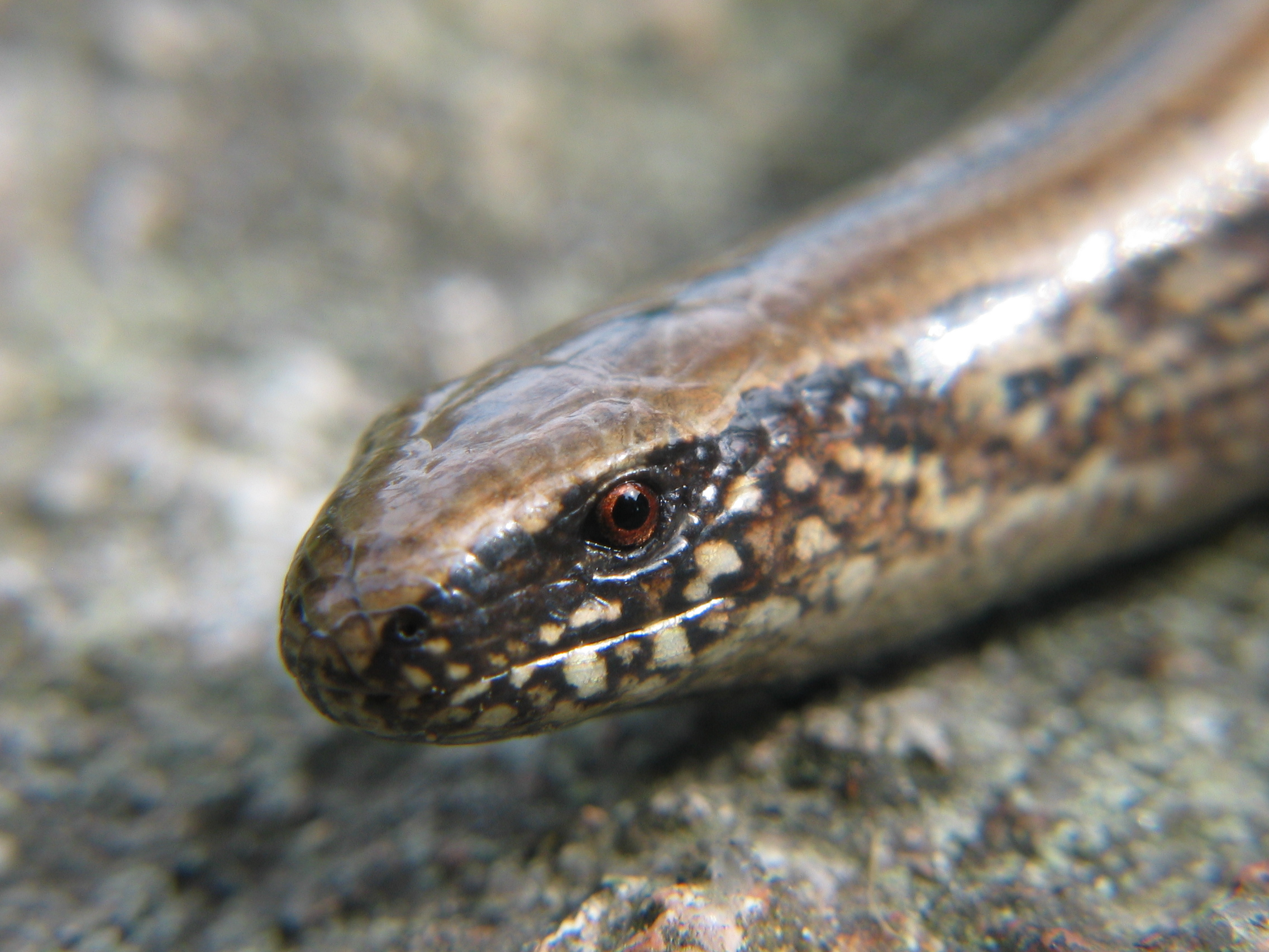 Slowworm, photo taken in Sweden